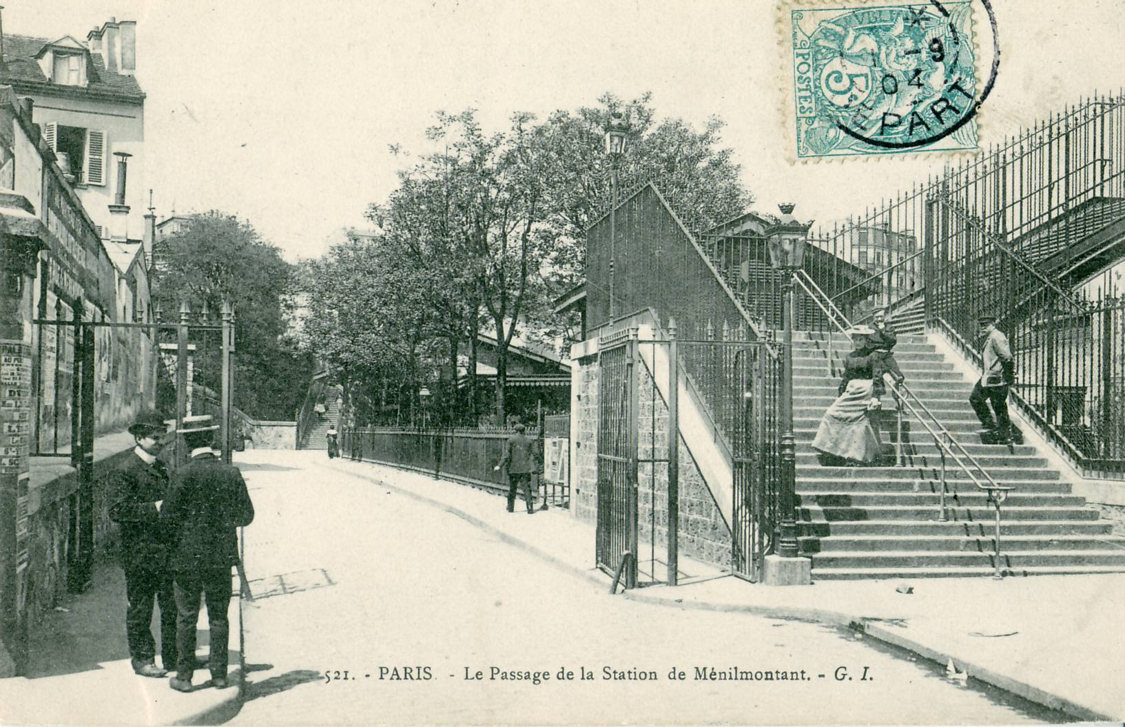 Carte postale ancienne éditée par GI n° 521. Passage de la Station-de-Ménilmontant, Paris 20e. C'est dans ce passage, dont l'usage fut condamné vers 1970 et dont il ne subsiste qu'un fragment, que se trouvait la station Ménilmontant, sur la ligne de chemin de fer de la Petite Ceinture, dont la passerelle caractéristique est bien reconnaissable.